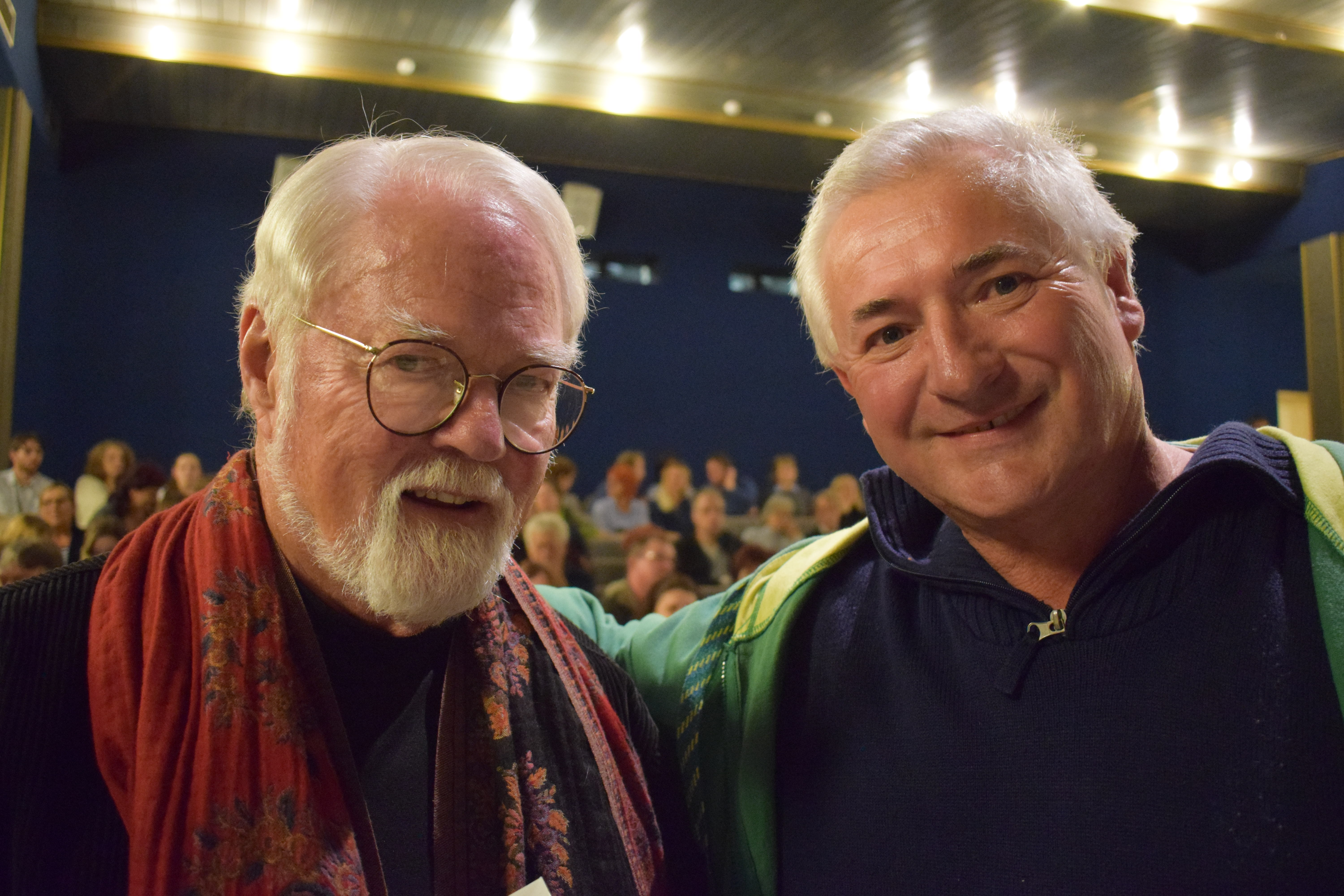 V sedlčanském kině byl pan Robert F na besedě o své nové knize Opravář osudů.